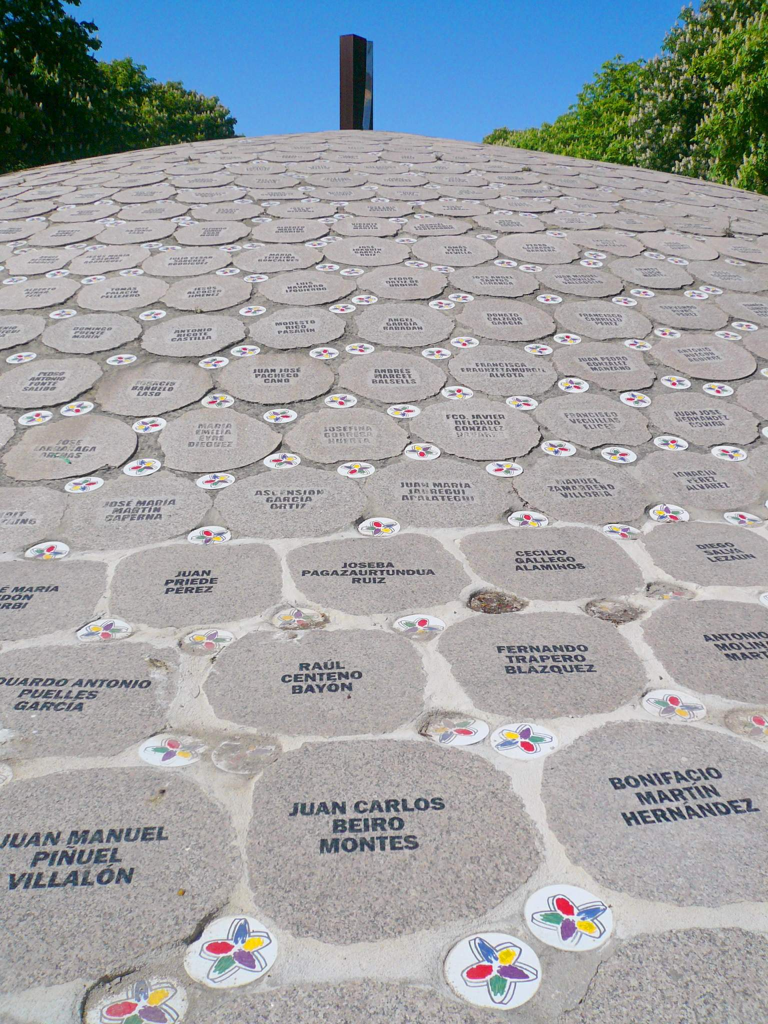 Monumento a las Victimas de ETA (Vitoria)